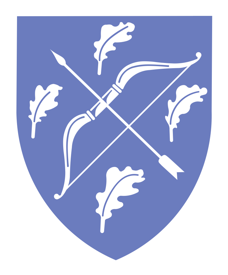 Dianalund kommunes våbenskjold